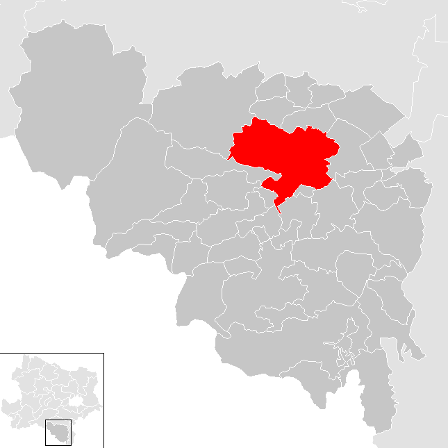 Bezirk Neunkirchen